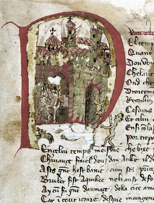 Manuskript of La Guerra d'Attila (Italie, Modène, bibliothèque Estense)